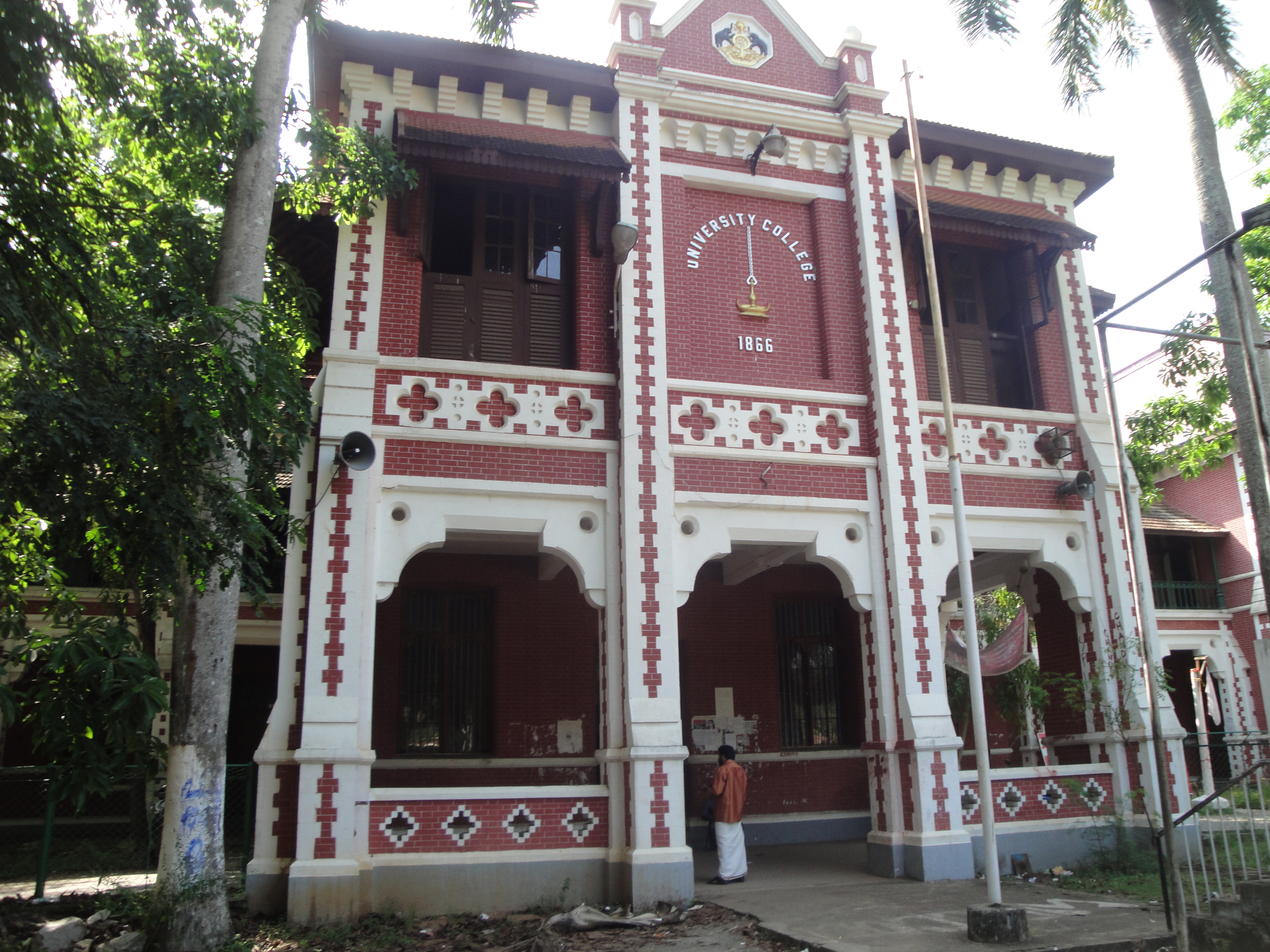 യൂണിവേഴ്സിറ്റി കോളേജ്, തിരുവനന്തപുരം